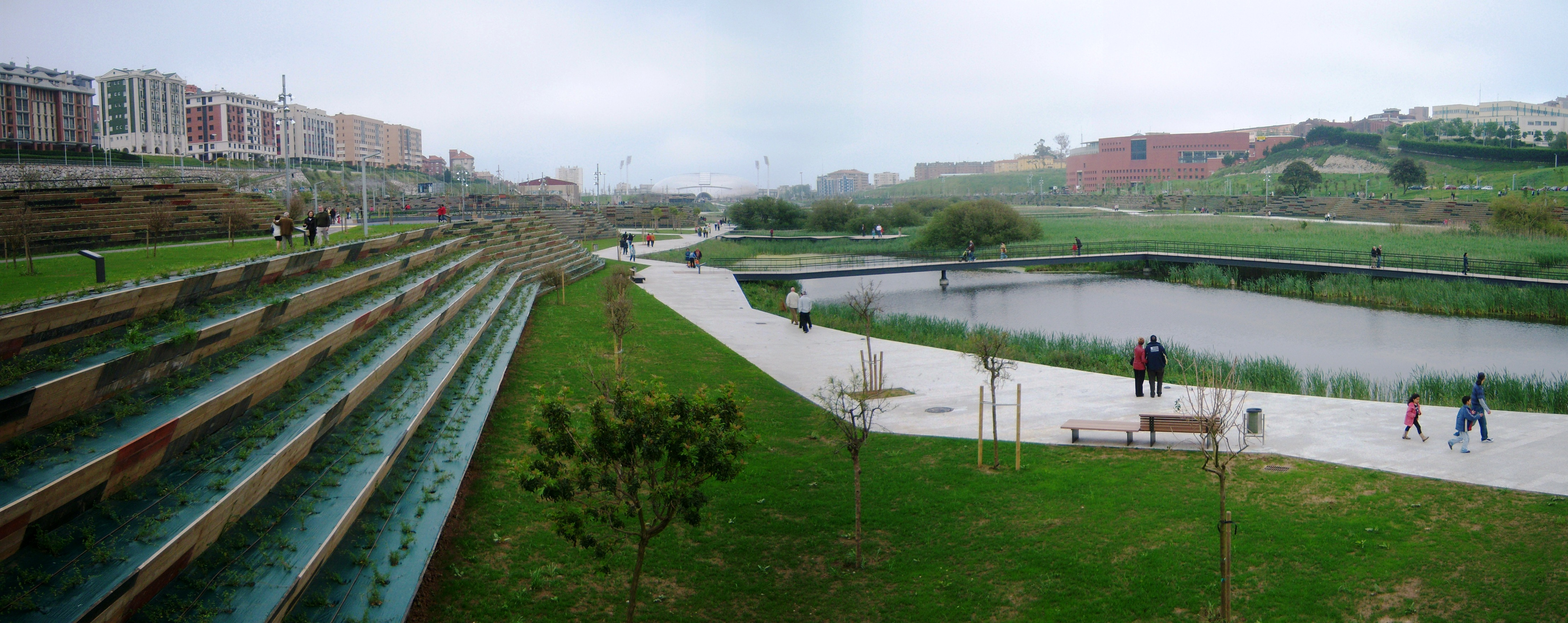 Panorámica del Parque Atlántico de las Llamas en Santander (Cantabria, España).